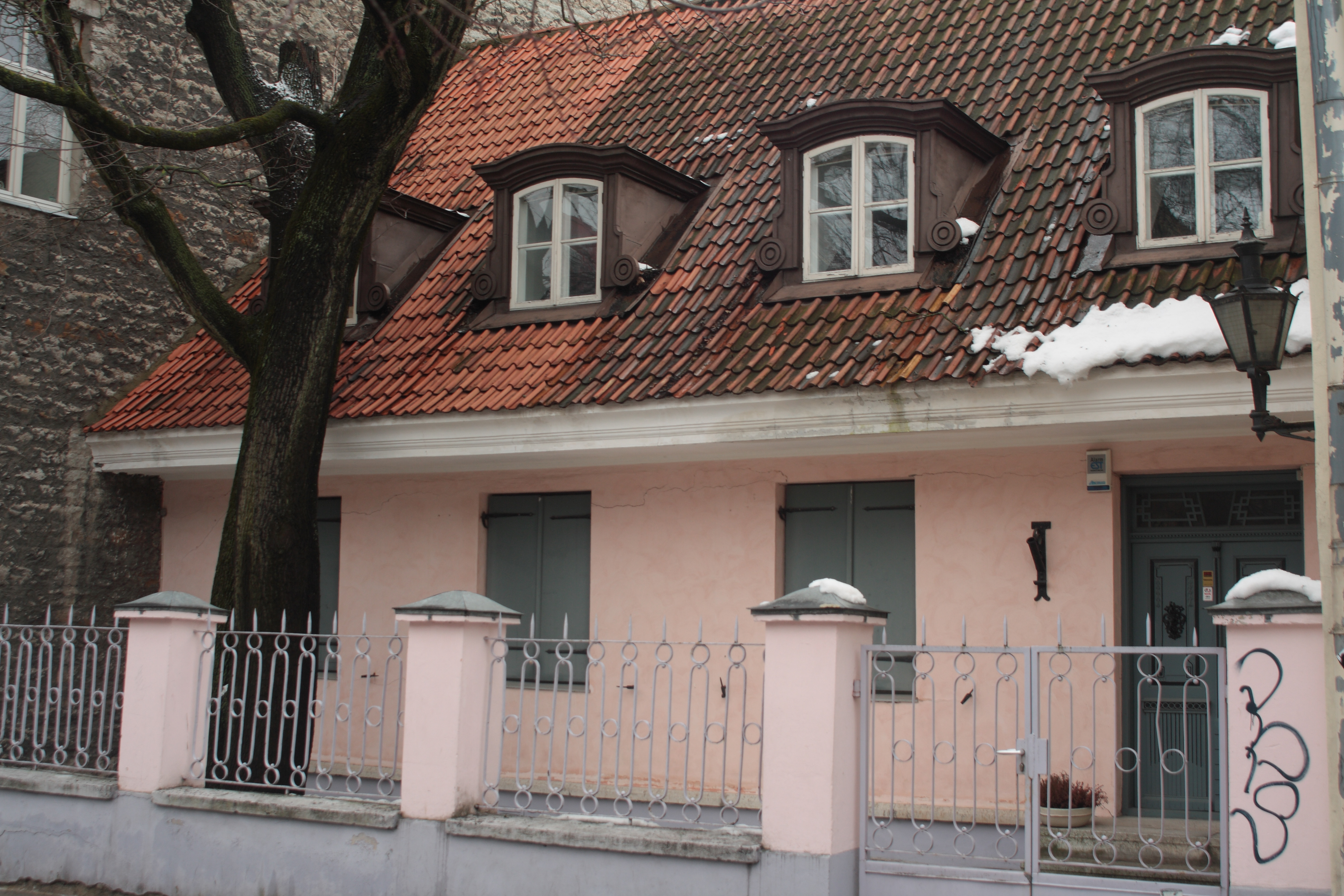 Muinsuskaitseameti peamaja, 2012